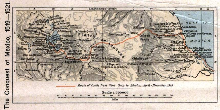 "The Conquest of Mexico, 1519 - 1521" aus "The Historical Atlas by William R. Shepherd, 1923" heruntergeladen von ll